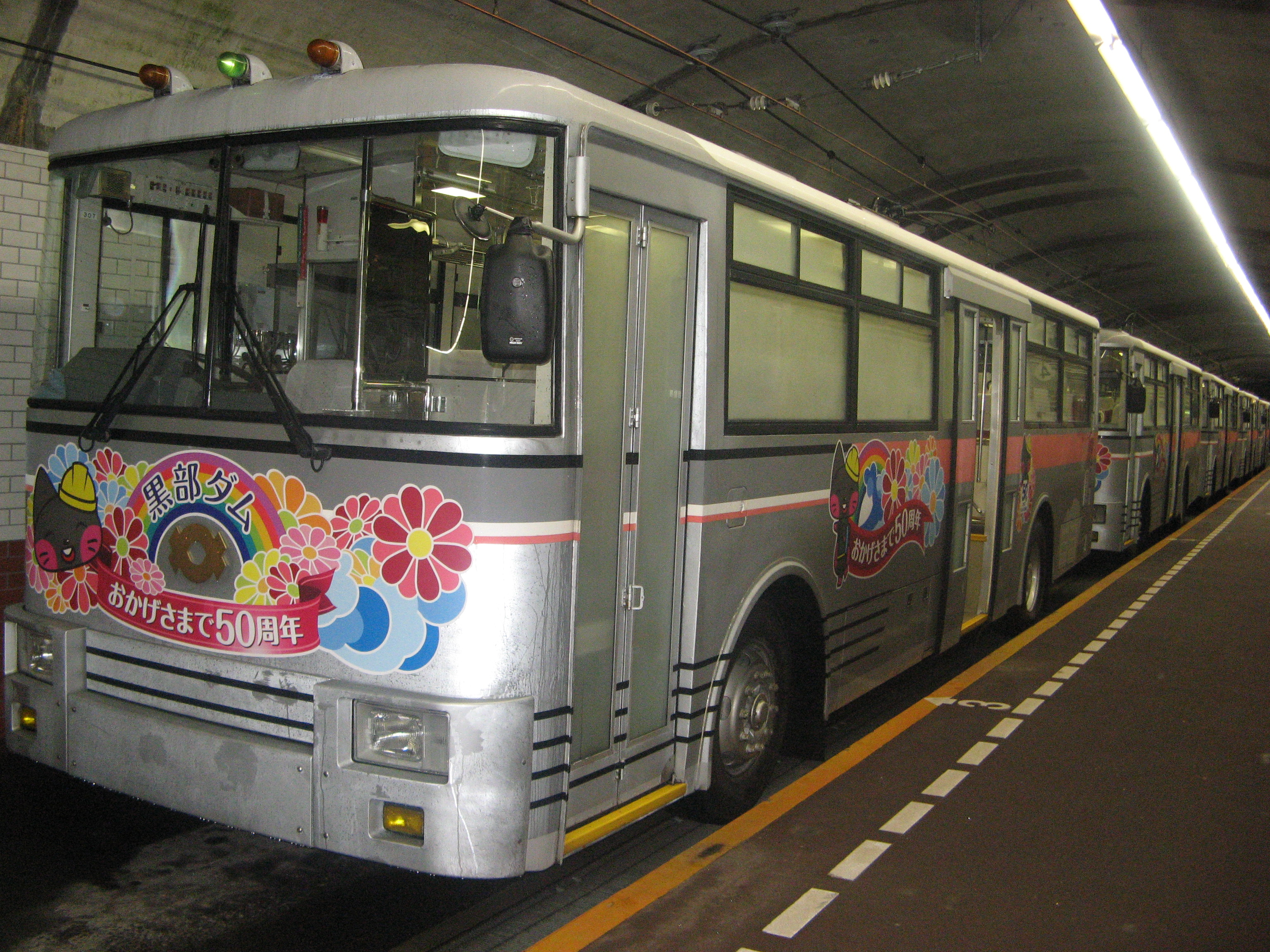 黒部ダム駅に停車中の関西電力300形無軌条電車。黒部ダムの完成50周年のラッピングフィルムを貼付。